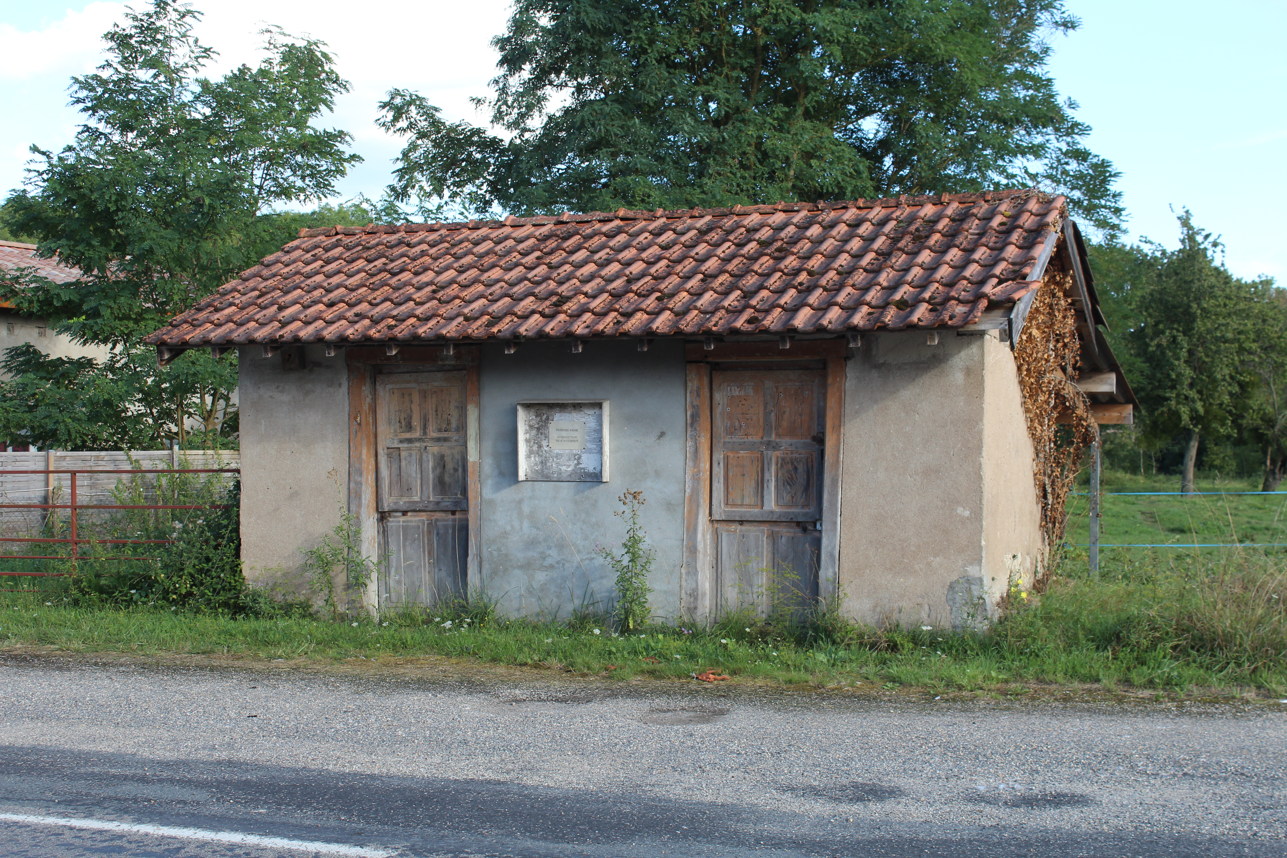 Gare de Coberthoud à Dommartin dans l'Ain.